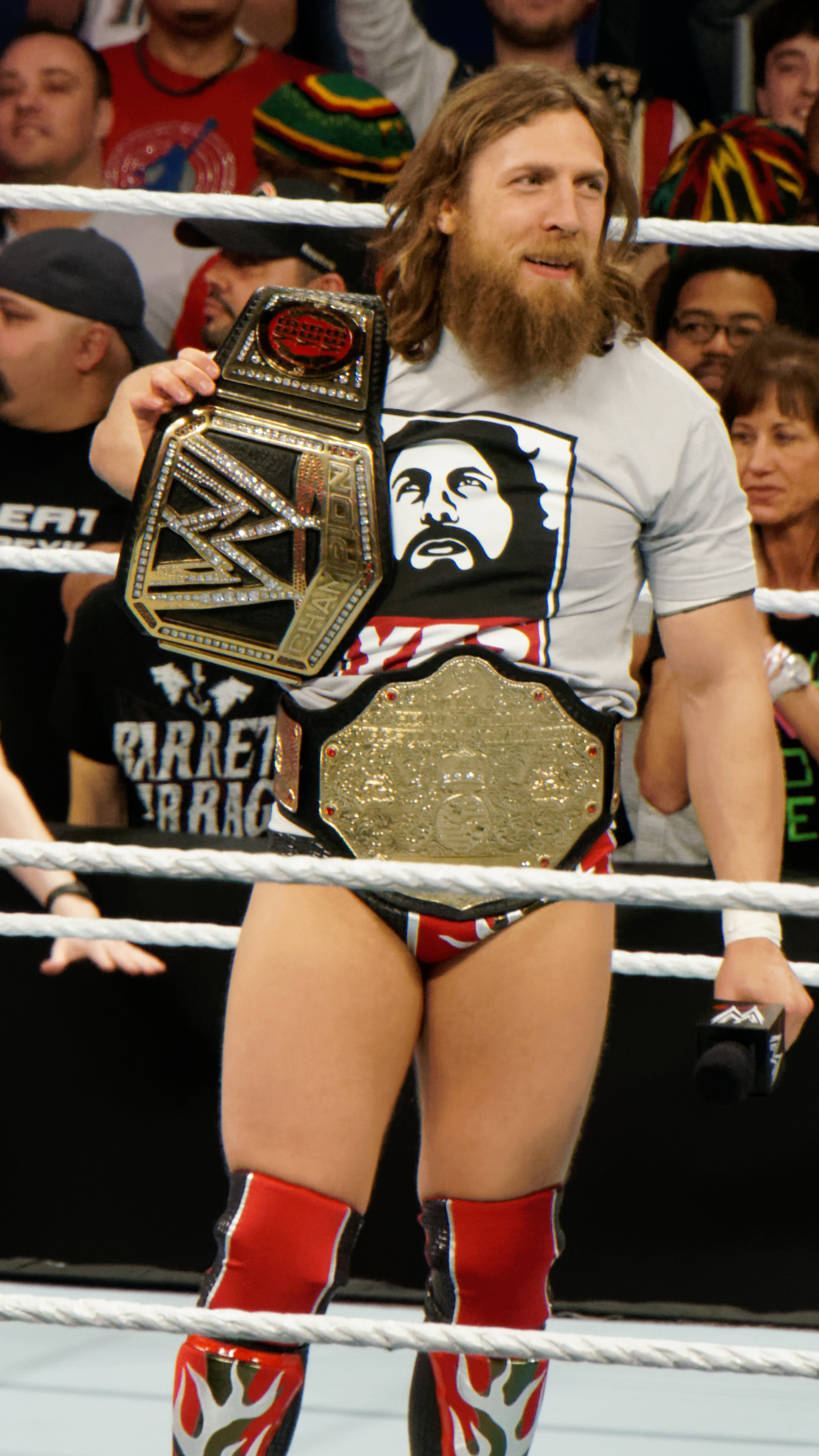 2014-04-07_19-07-05_NEX-6_0796_DxO